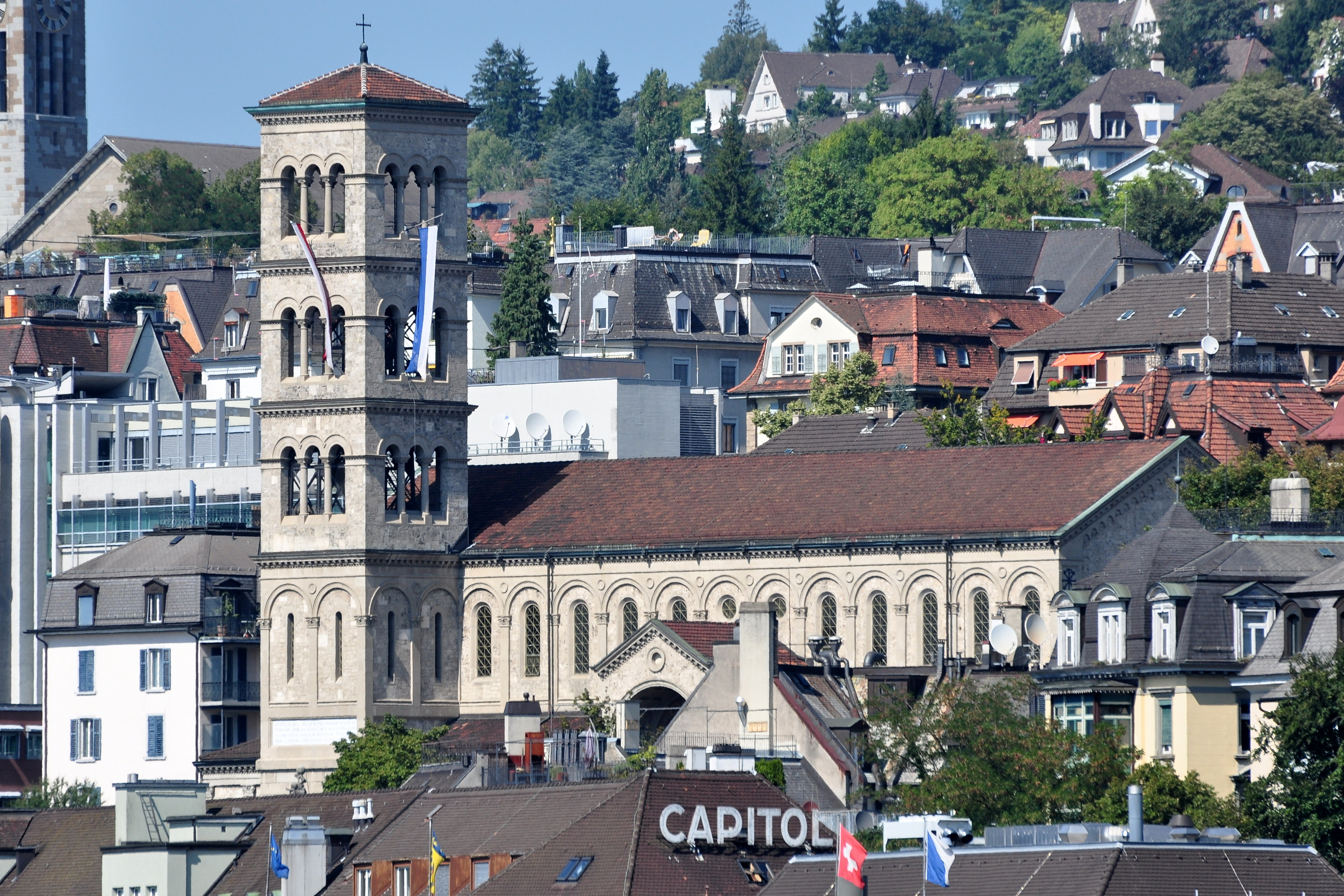 Liebfrauenkirche in Zürich-Unterstrass (Switzerland) as seen from Lindenhof hill